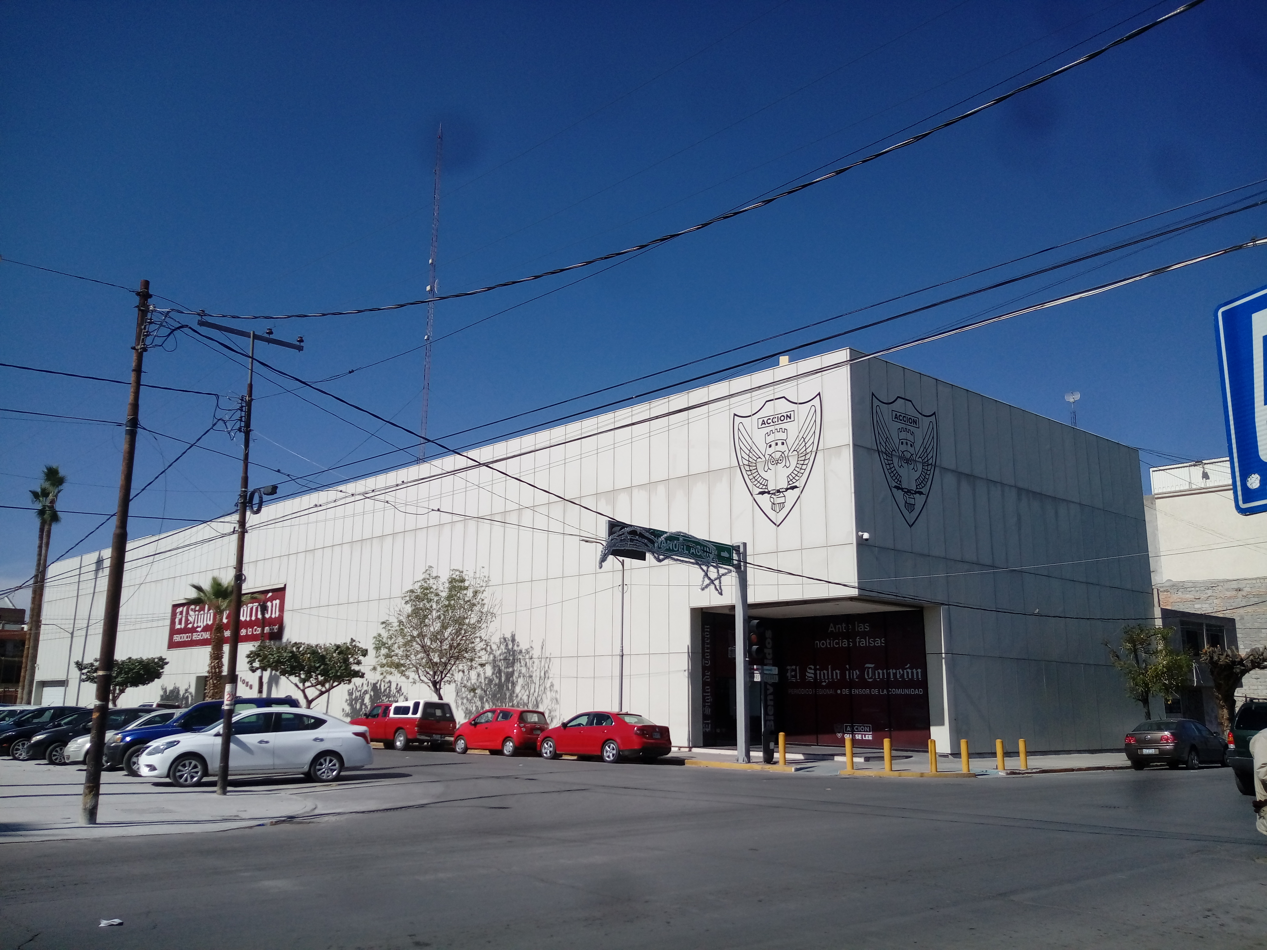 Edificio que alberga las oficinas de El Siglo en el centro de Torreón sobre la avenida Matamoros